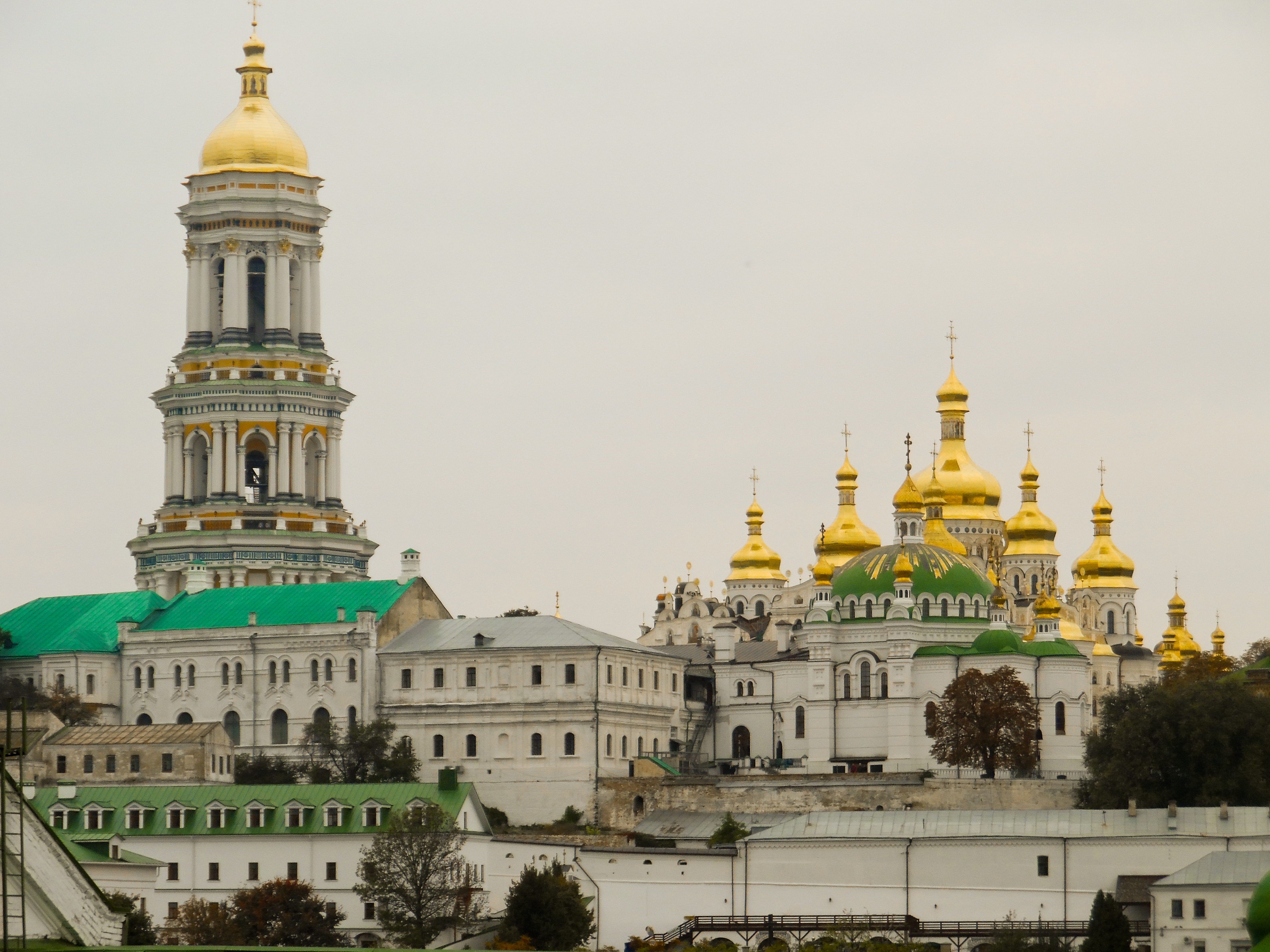 Комплекс Києво-Печерської лаври (Національний заповідник Києво-Печерська Лавра), Київ, Лаврська вул., 9, 15